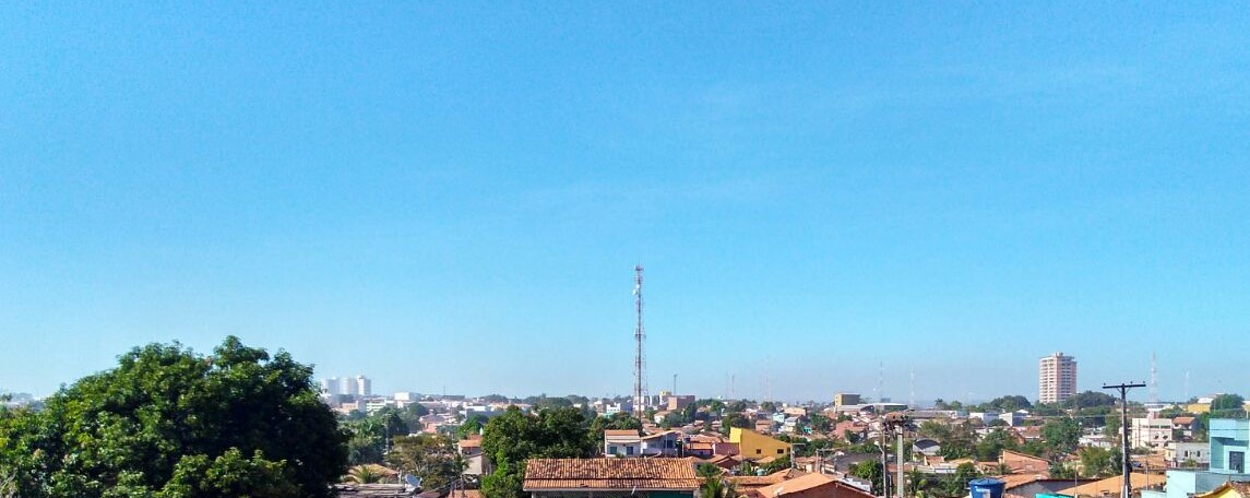 Vista panorâmica da Nova Marabá, a partir do bloco administrativo do Campus Industrial de Marabá do Instituto Federal do Pará.